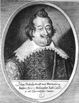 Johann Baptist Verda von Verdenberg (ca.1573-1648) österreichischer Hofkanzler